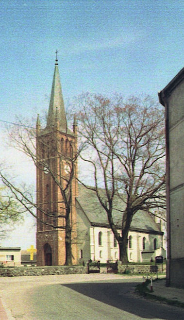 Gardna Wielka, Church